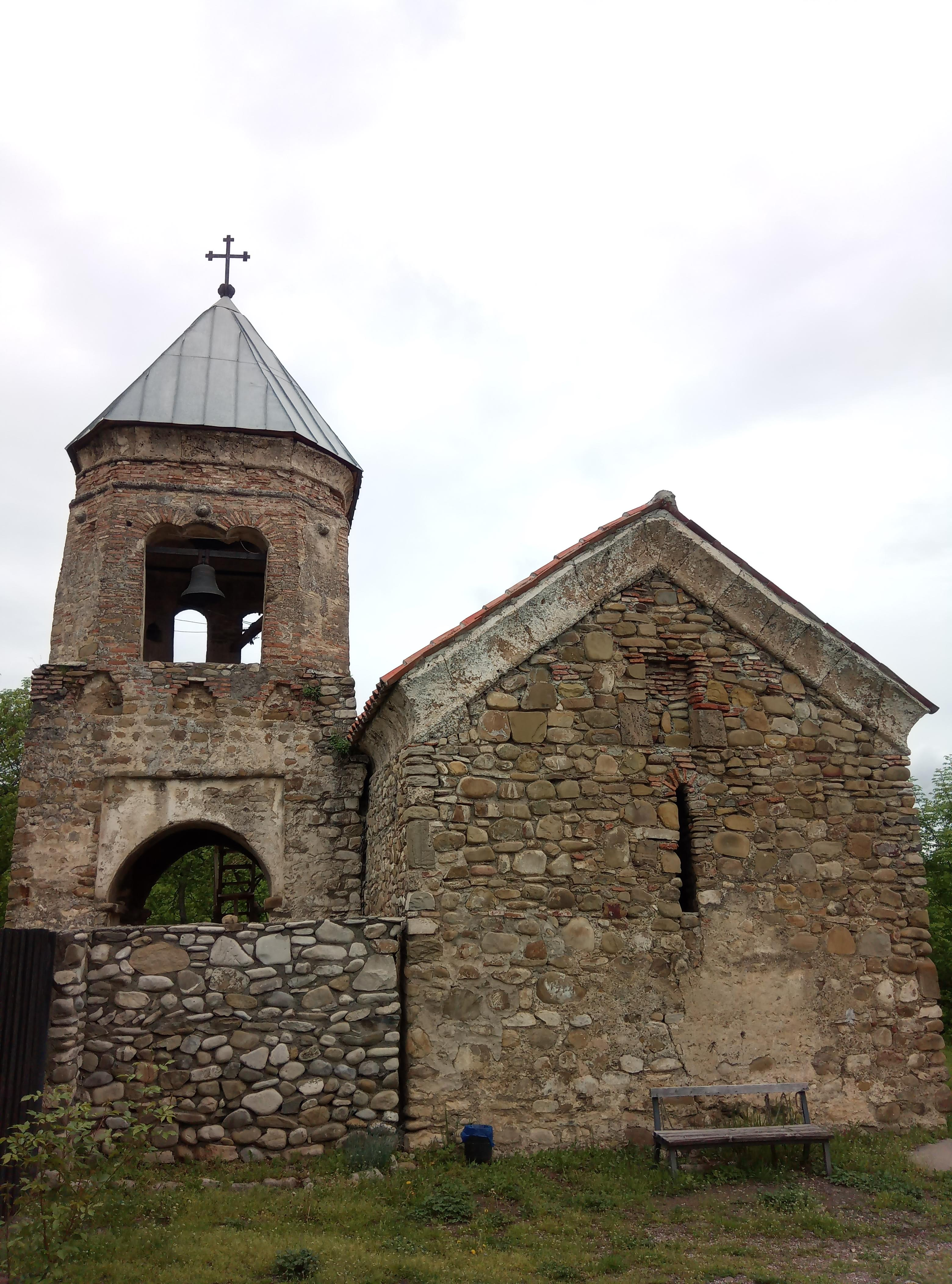 ვეჯინის ციხის წმინდა მარიამის ეკლესია